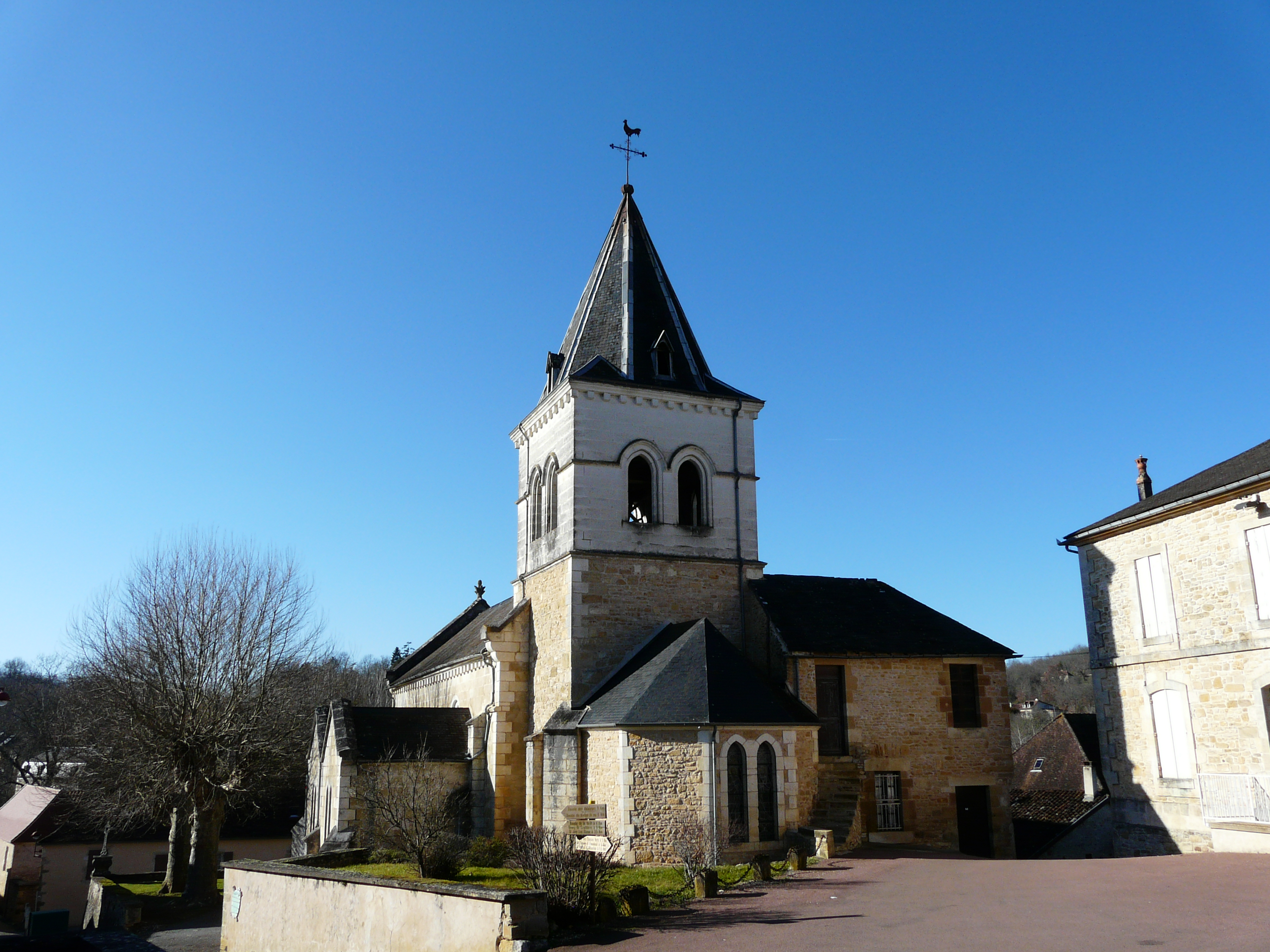 L'église Saint-Germain, Saint-Germain-des-Prés, Dordogne, France.